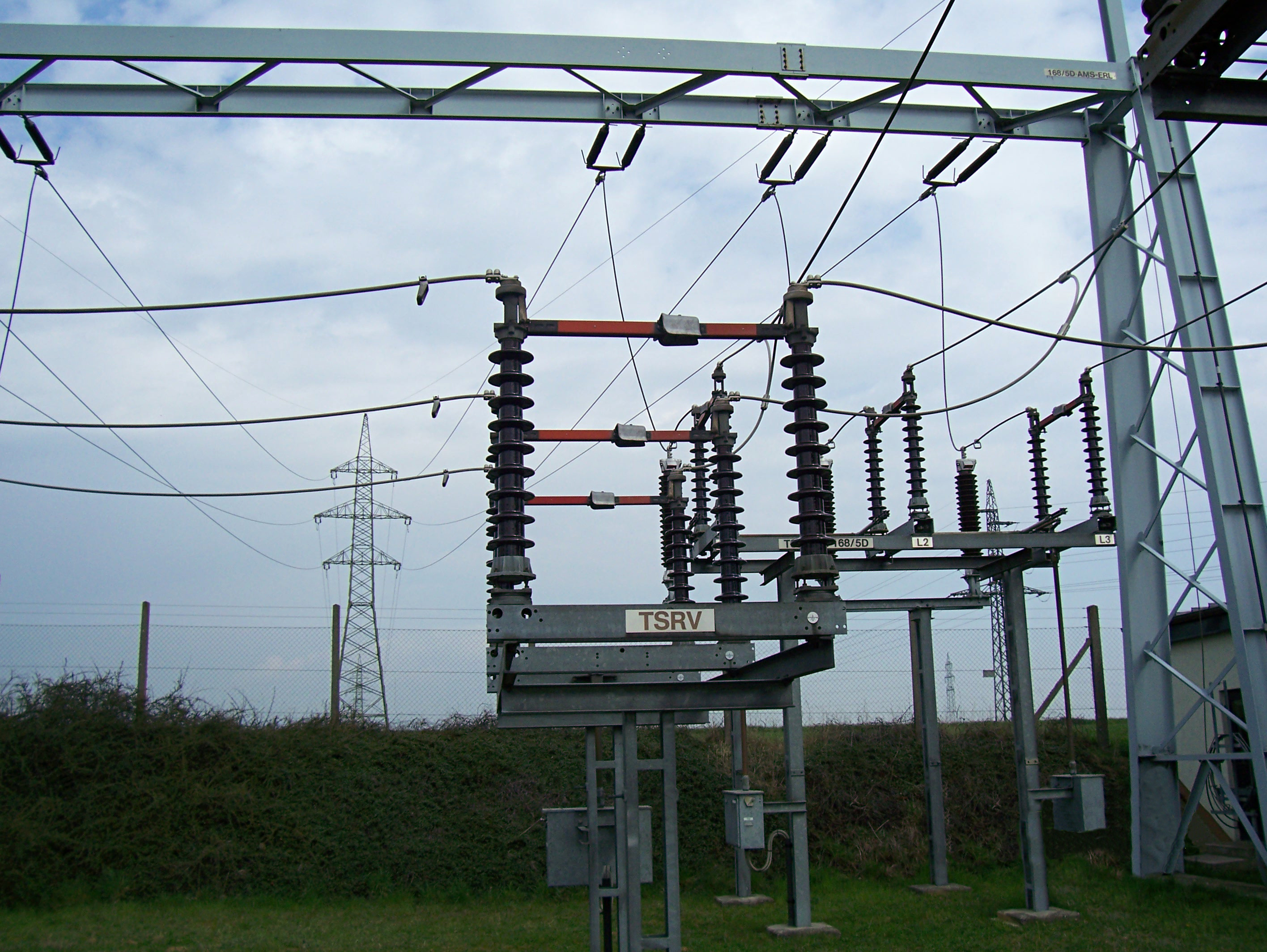 Trennschalter für 110 kV in einer Freiluftschaltanlage der EVN, Österreich Kamera: Kodak C663 Danksagung: Unter freundlicher Mitwirkung und Unterstützung der: EVN AG, EVN Platz, 2344 Maria Enzersdorf, Hr. E. Jungwirth & Hr. Mag. S. Zach